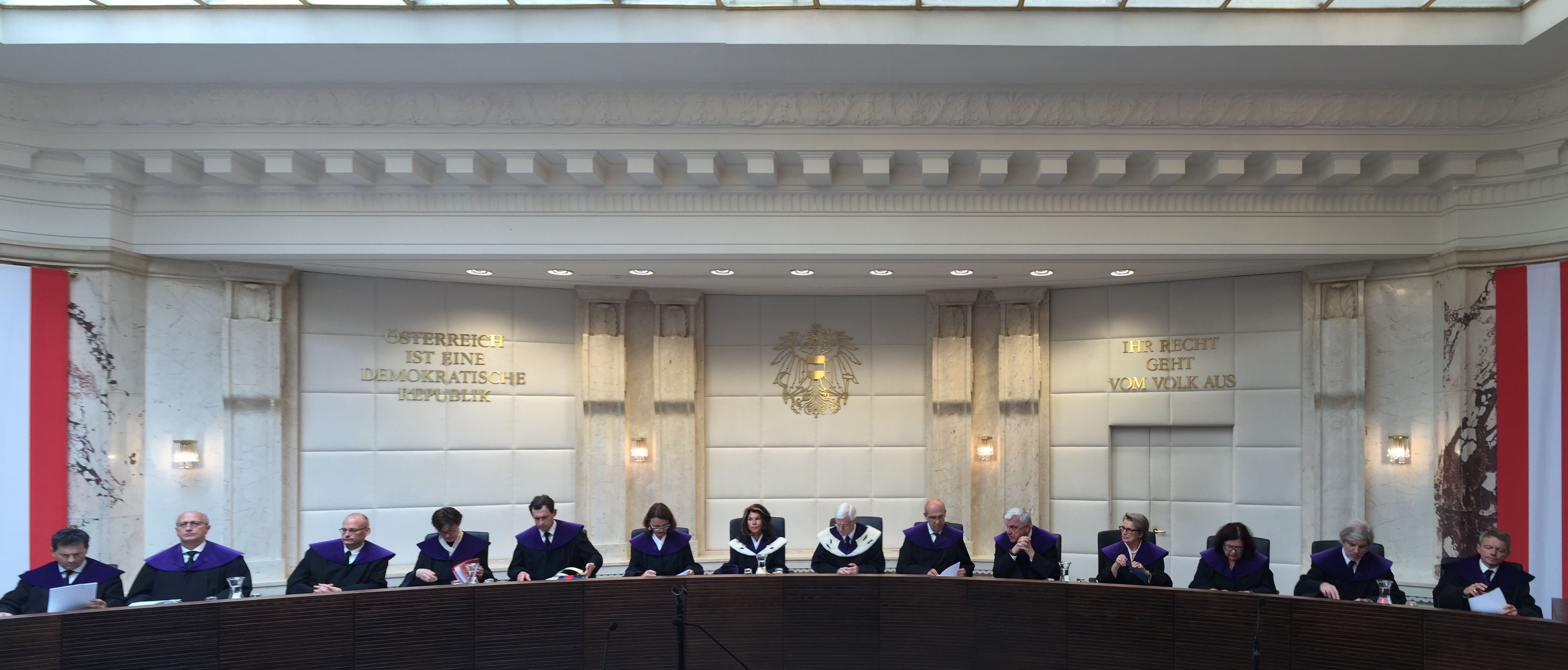 Verhandlung der Wahlanfechtung der Bundespräsidentenwahl in Österreich 2016